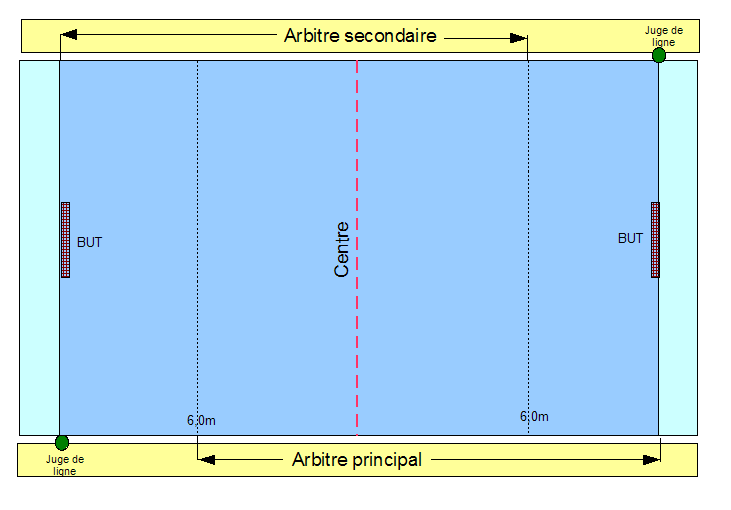 Schéma représentant un terrain de kayk polo